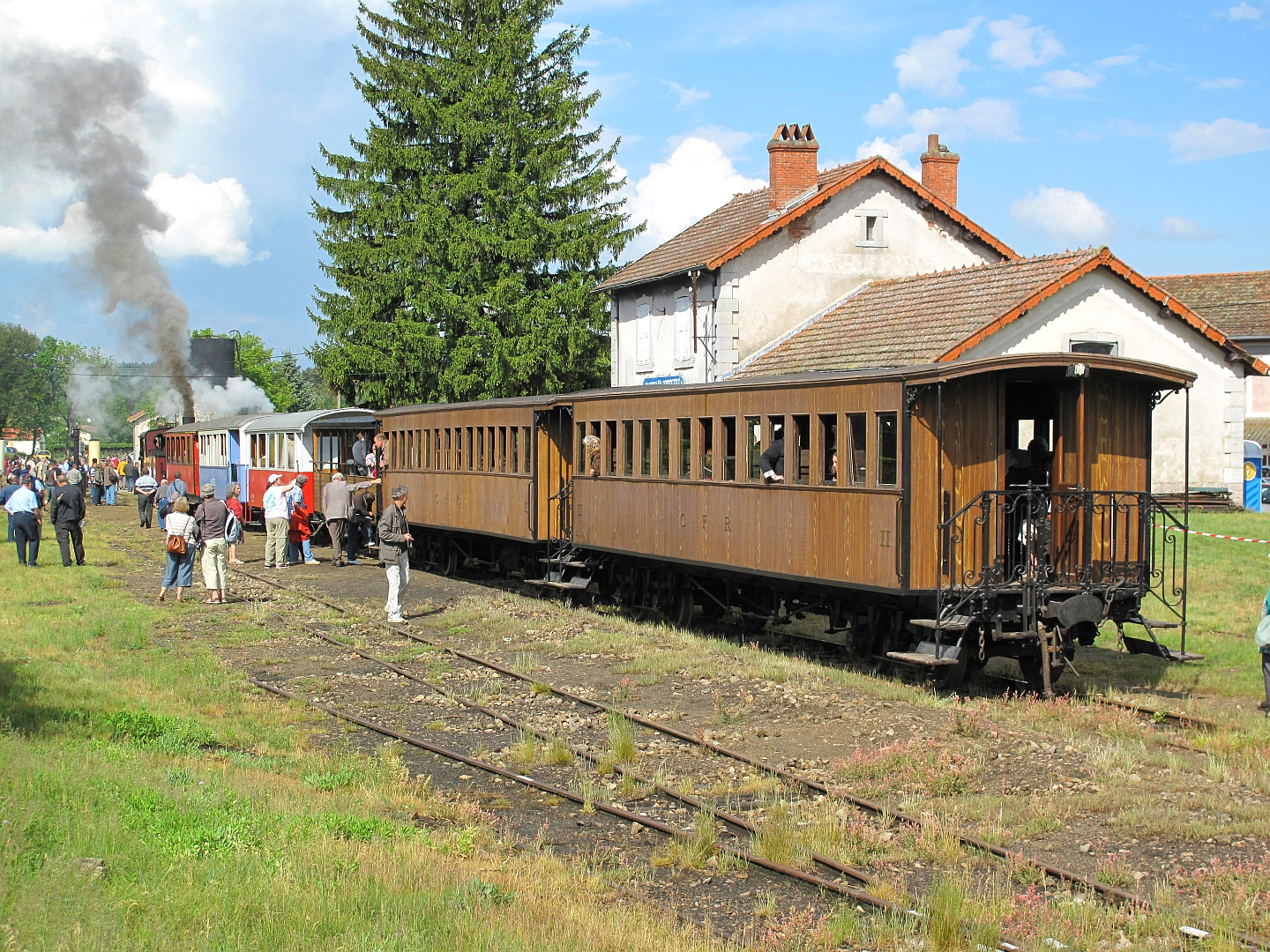 Un train en gare de Raucoules-Brossettes (Haute-Loire), sur le chemin de fer touristique des voies ferrées du Velay le 21 mai 2011.